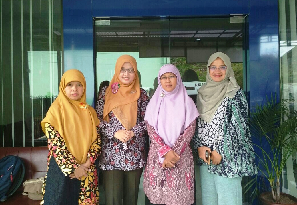 Pengurus Perkumpulan Guru Madrasah Penulis (Pergumapi) setelah penandatanganan Akta Notaris Pergumapi di Kantor Notaris Siti Nurhanifah, Bantul, DI Yogyakarta, Indonesia. Dari kiri: Noor Shofiyati, Septy Andari Putri, Siska Yuniati, Anita Isdarmini.